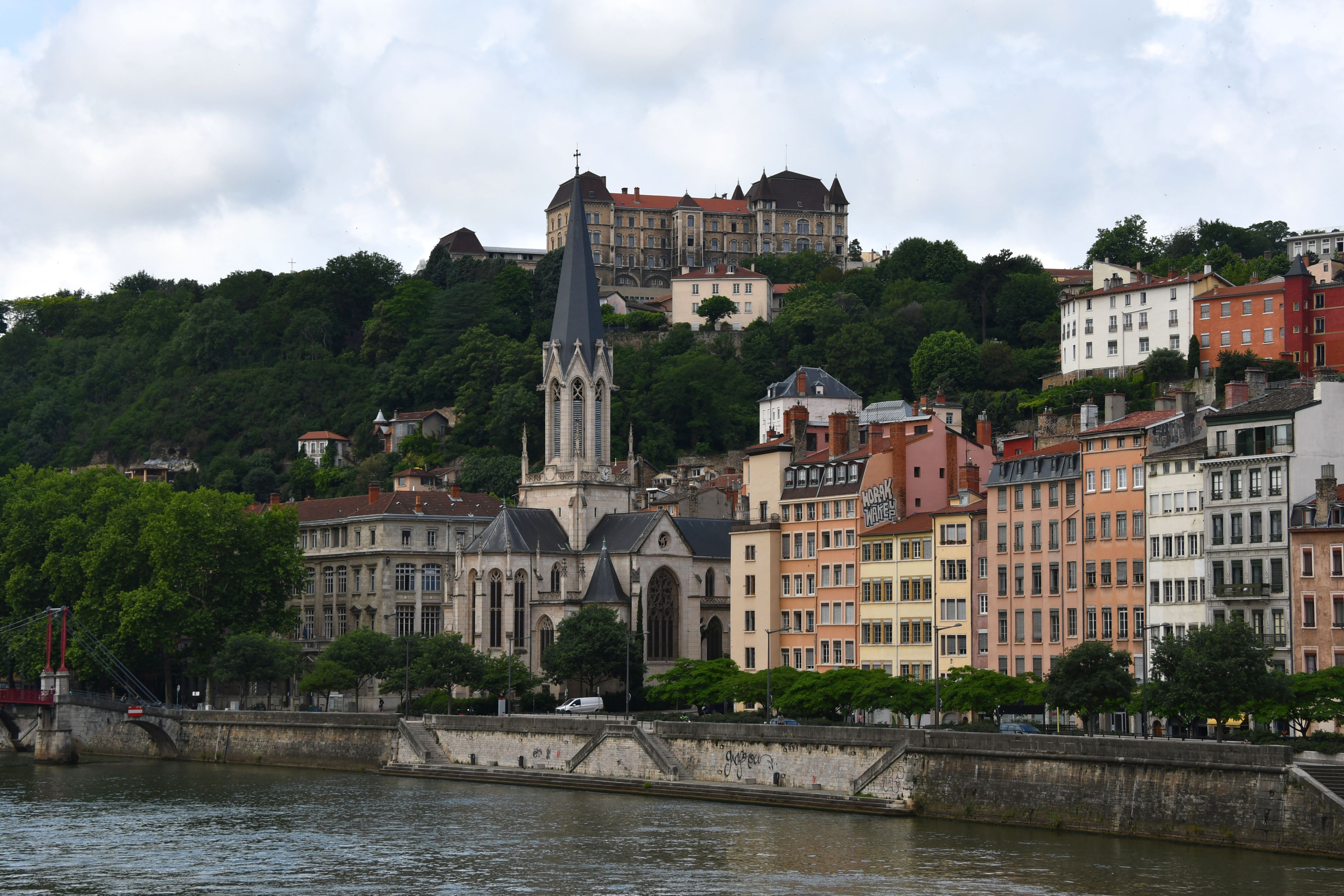 Lyon, an der Saône, Eglise Saint Georges